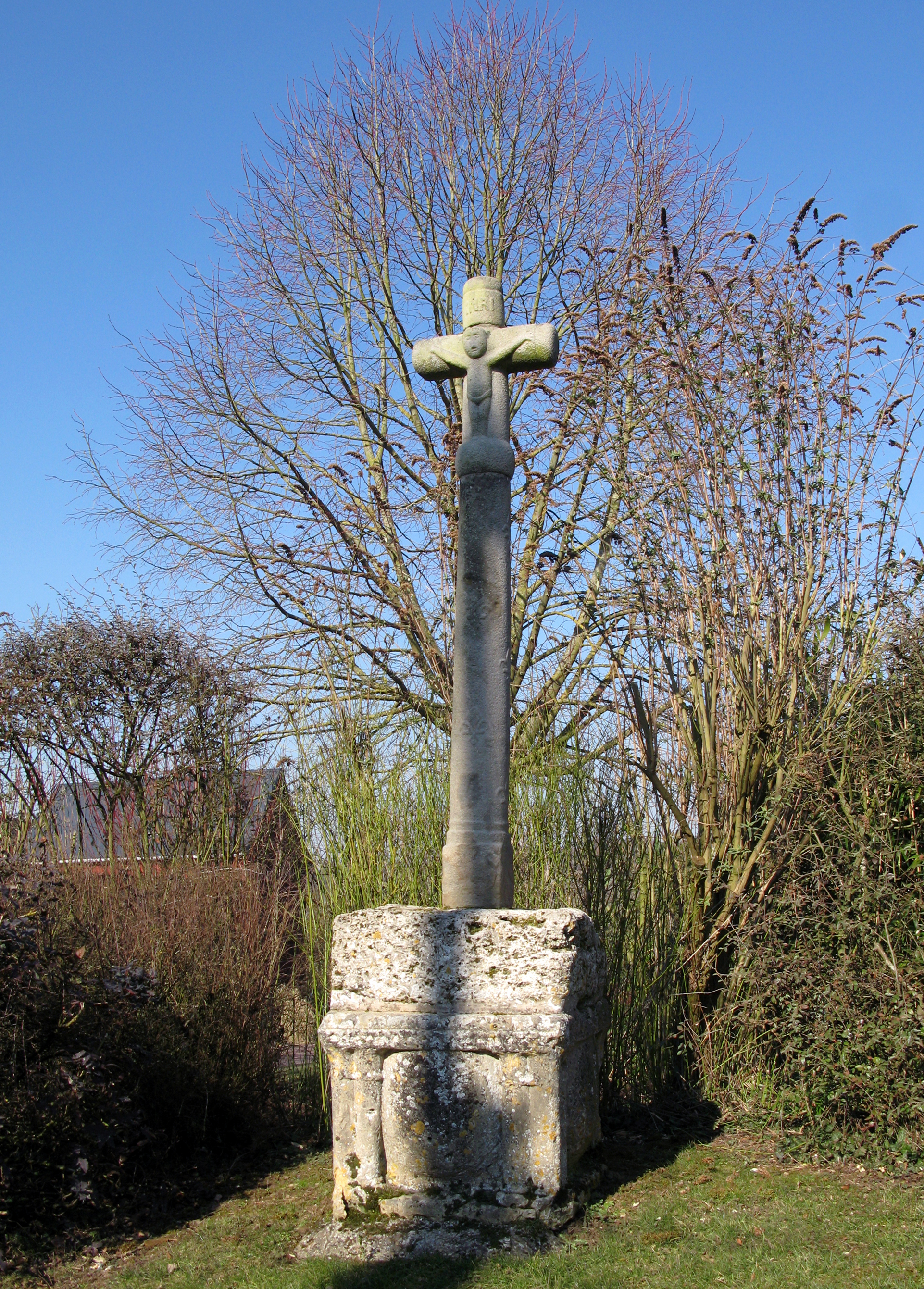 Havernas (Somme, France) - Le calvaire de pierre est situé après le monument-aux-morts, en direction de l'église. Il est constitué d'un socle cubique (ancienne cuve baptismale) sur lequel se dresse un fût de colonne décoré de plusieurs fleurs de lys. Je me trouvais sur les lieux alors que l'ombre d'un poteau électrique couvrait juste le fût de colonne ... (instant magique ?) ...